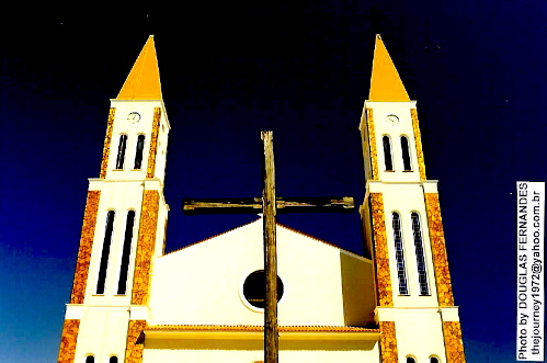 Igreja em Formosa, Goiás. Church in Formosa, Goiás, Brazil.